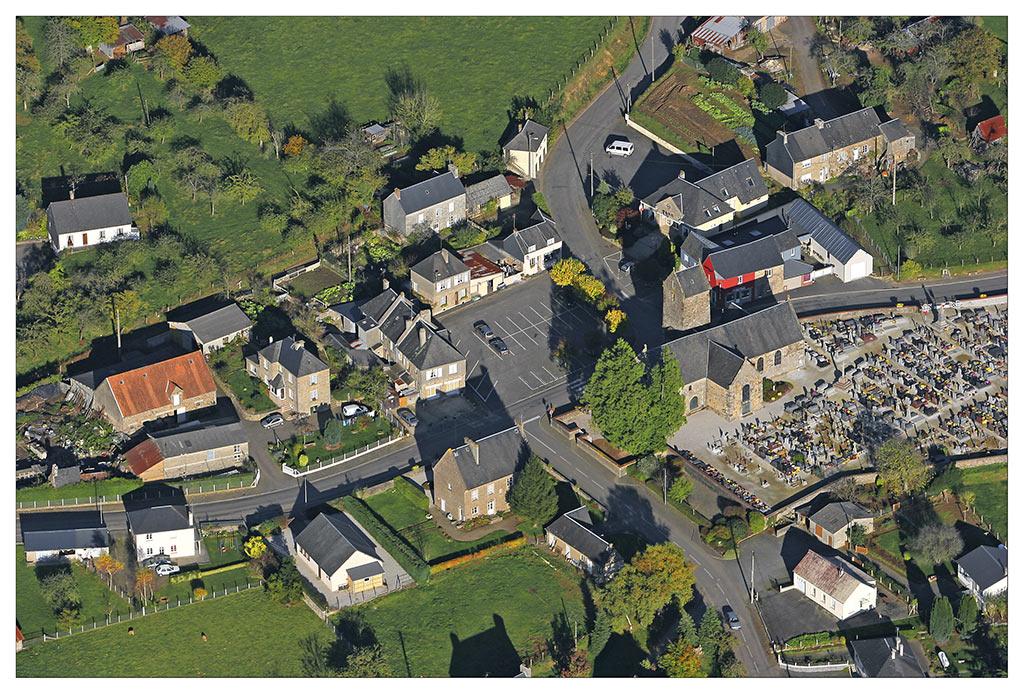 Vue aerienne du village de Romagny, Manche, Normandie, France, Europe.